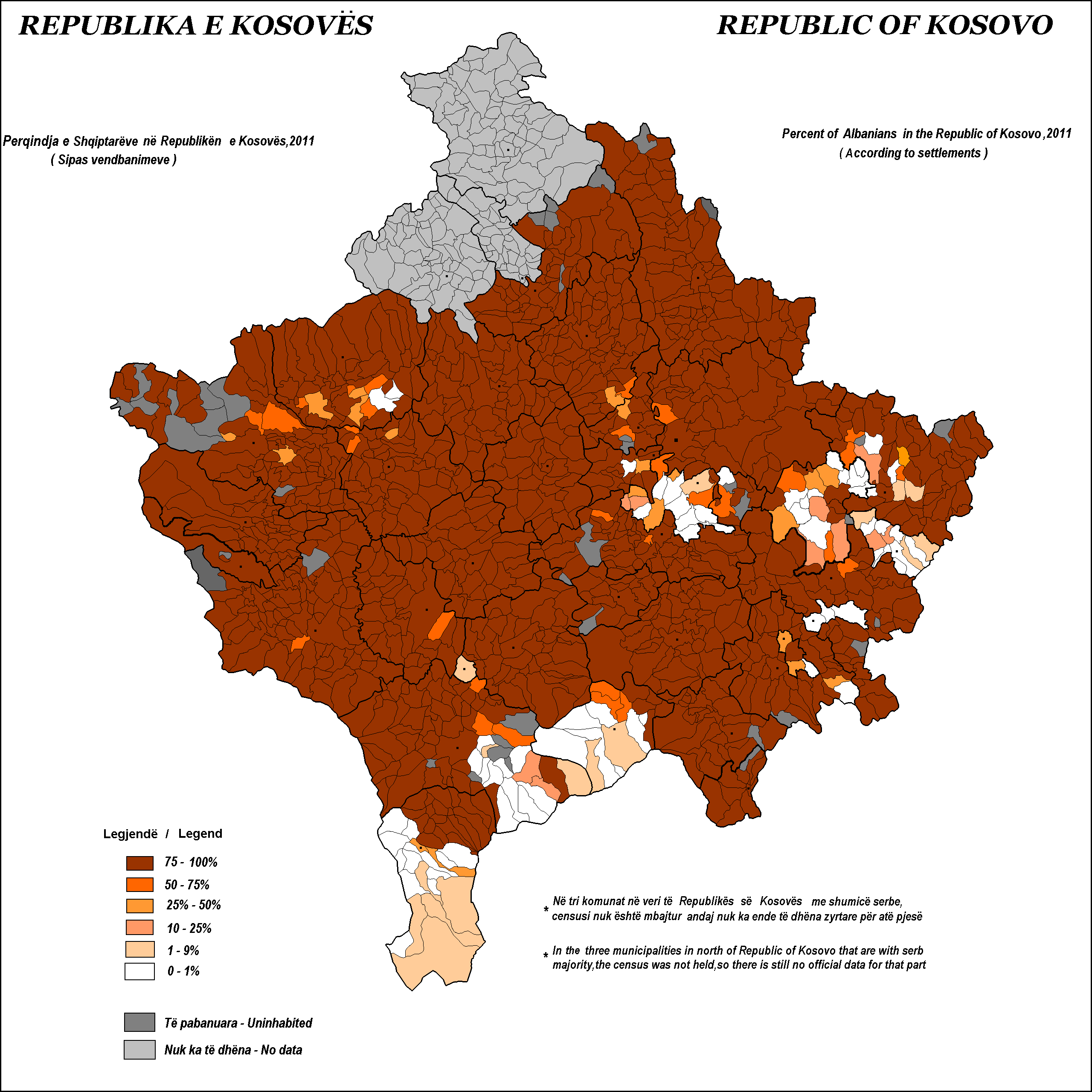 Perqindja e shqiptareve ne Kosove(sipas vendbanimeve)